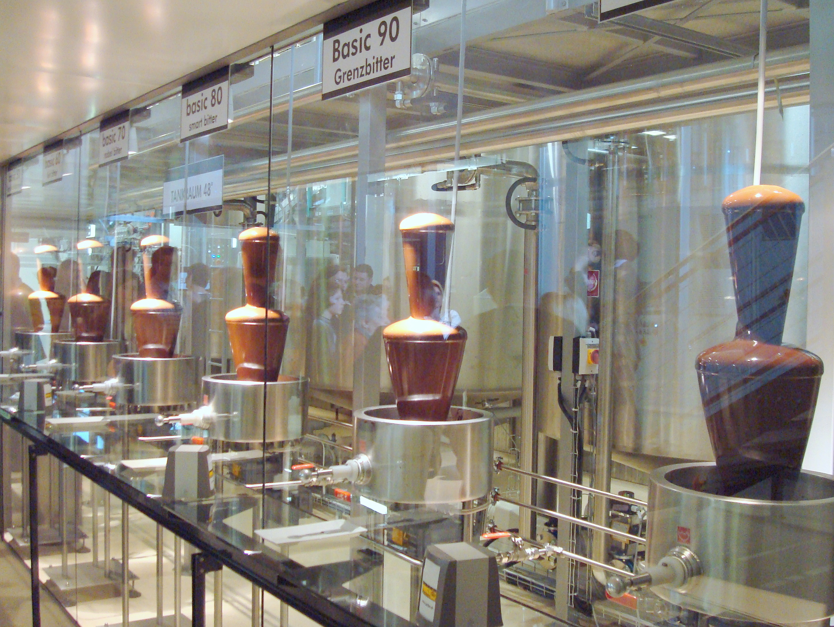 Schokoladenmanufaktur Zotter Bergl Riegersburg Schokotankstelle BASIC 50-100.JPG